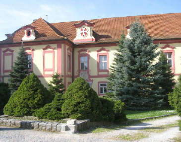 Kastelo en ĉeĥa urbo Horažďovice